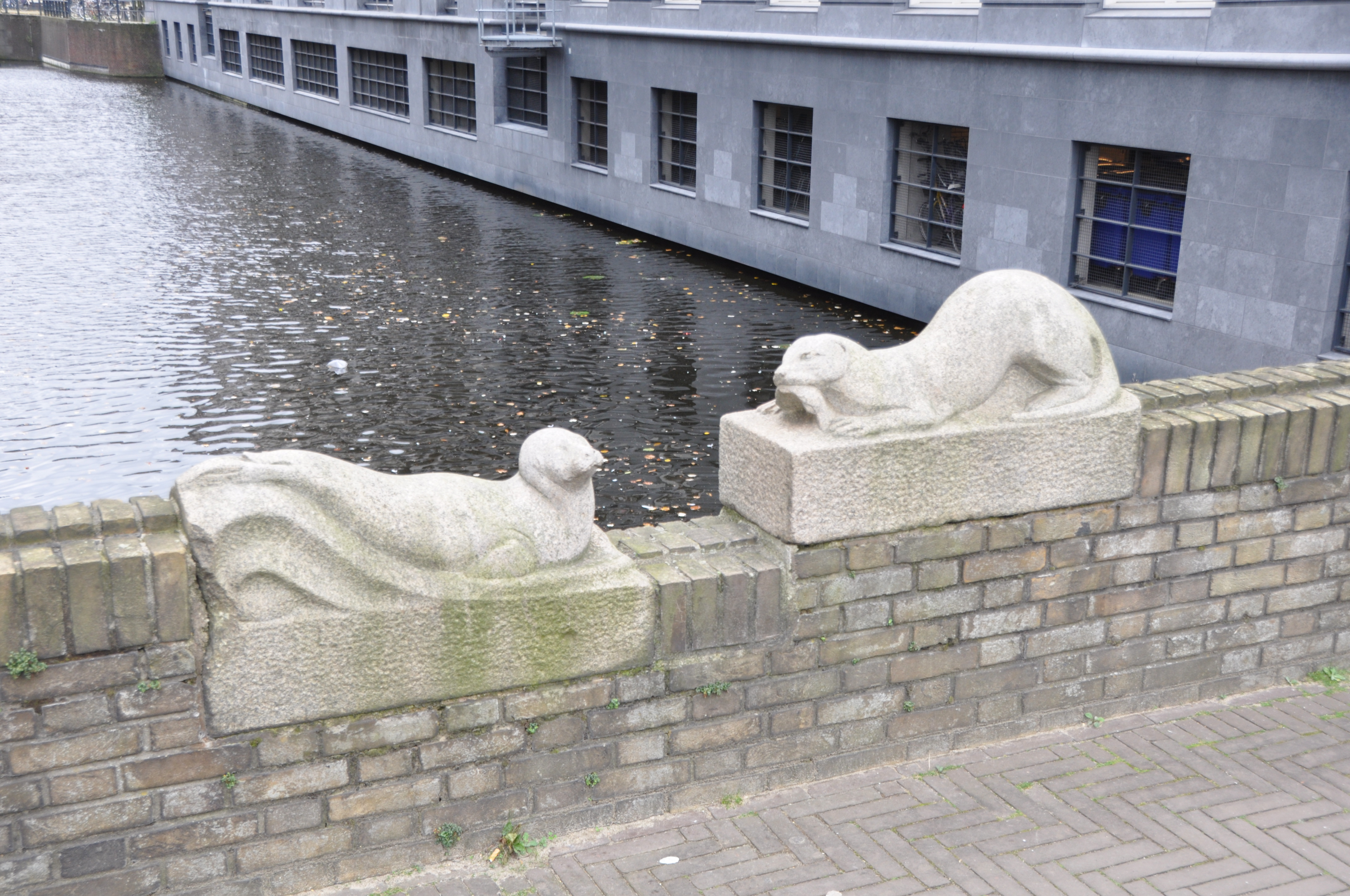 Bruggen in Den Haag.